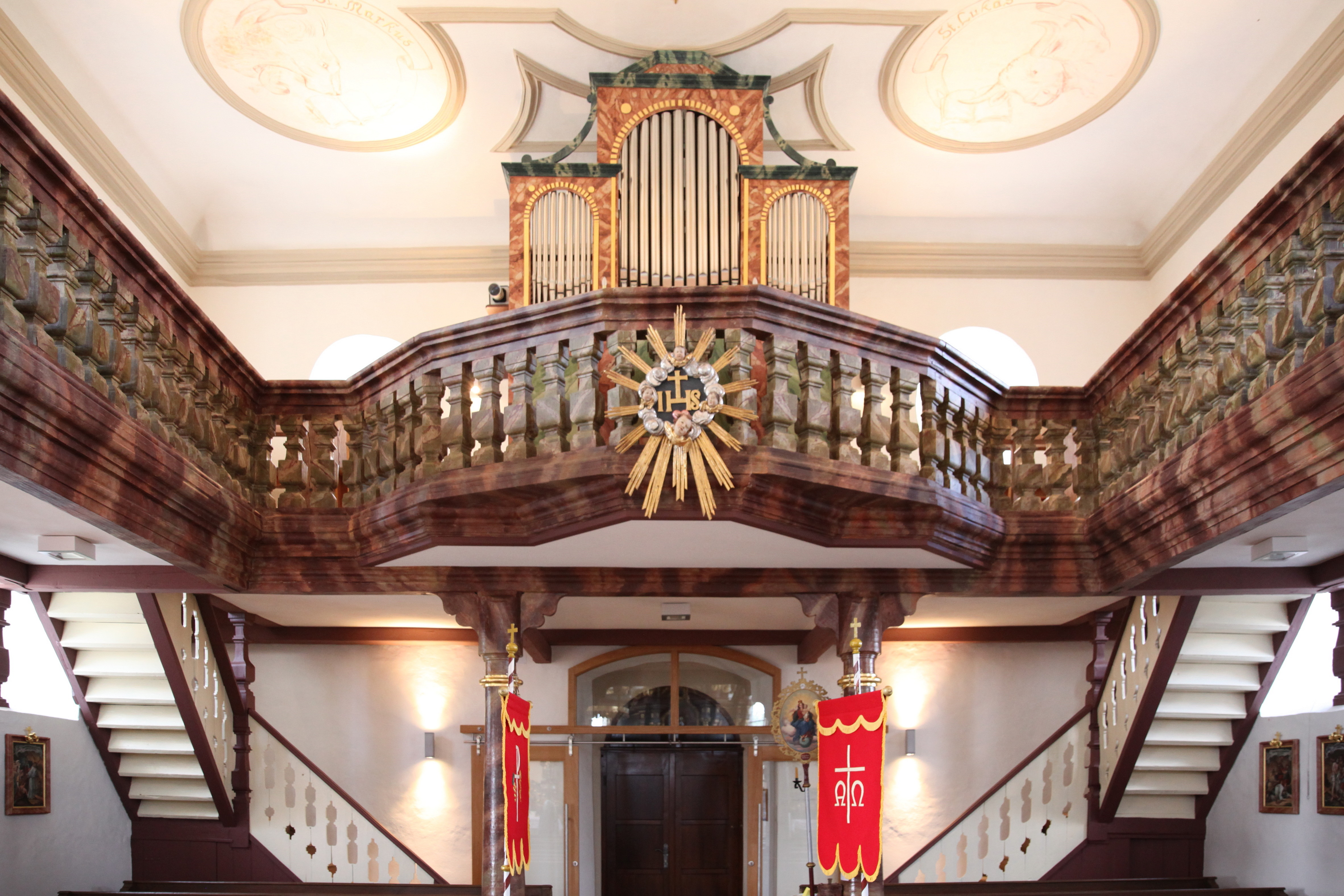 St. Clemens und Wendelin in Neudorf/Weismain